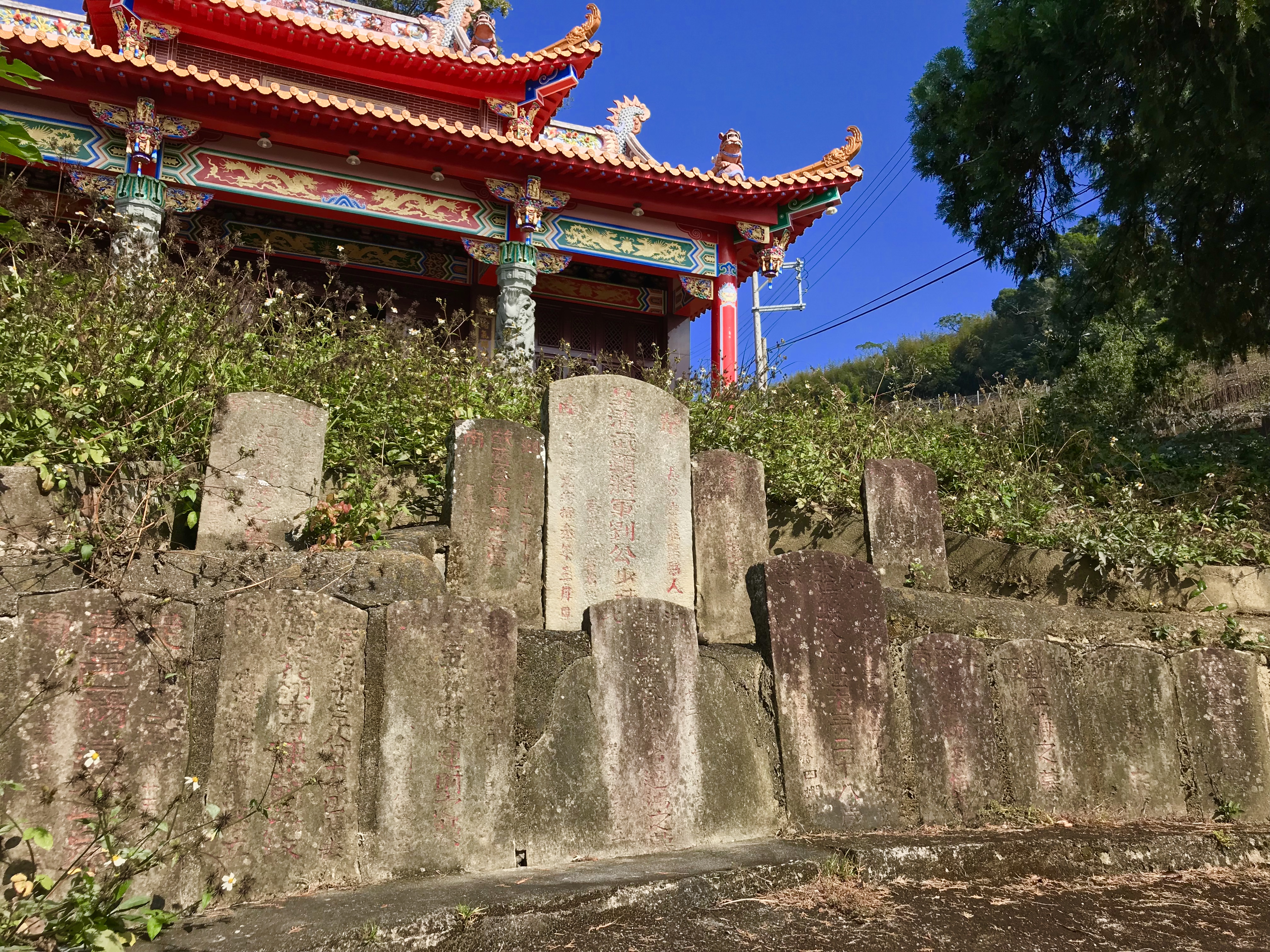 軍民廟墓碑